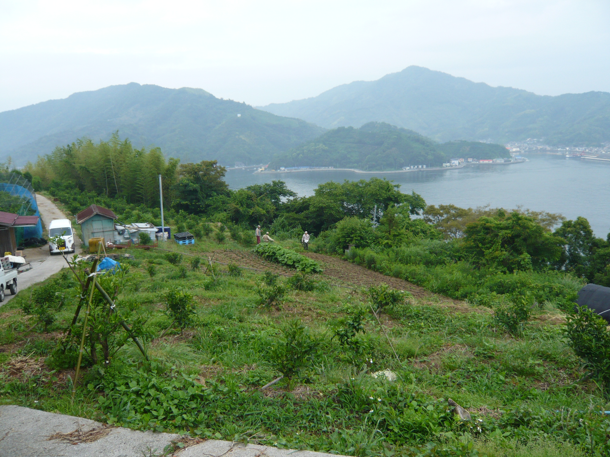 これはUwajima-taroが自ら撮影したものであり、何人の著作権も侵していない。